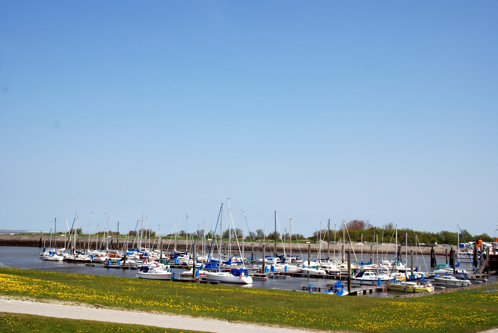 Der Yachthafen im Nordseeheilbad Bensersiel.